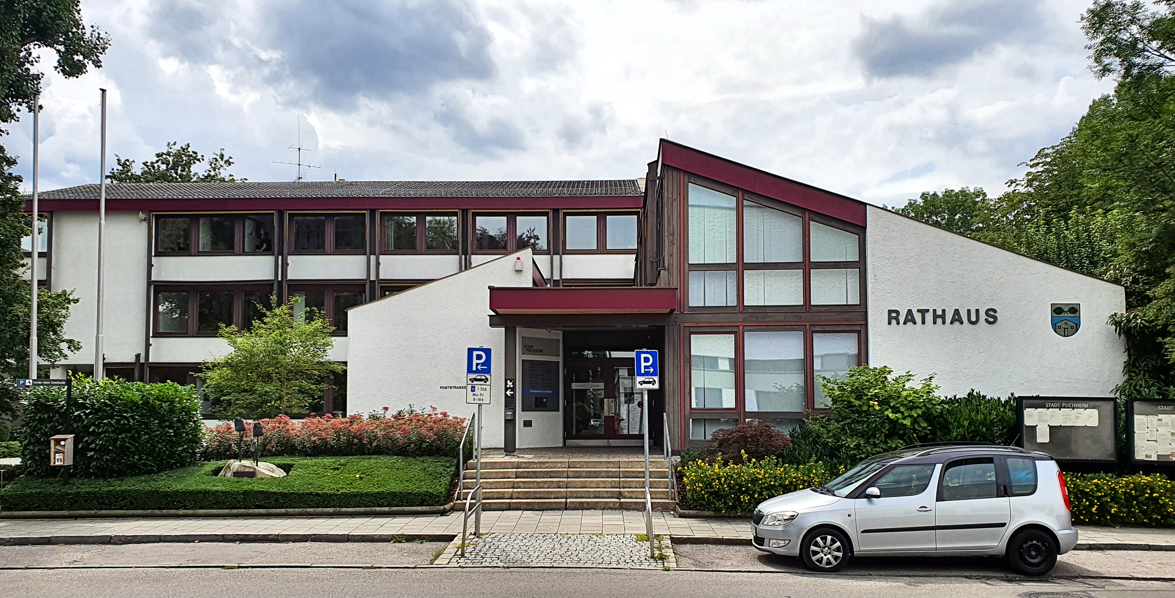 Deutschland, Bayern, Oberbayern, Landkreis Fürstenfeldbruck, Stadt Puchheim, Rathaus